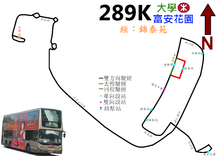 中文（香港）: 九巴289K線的走線圖